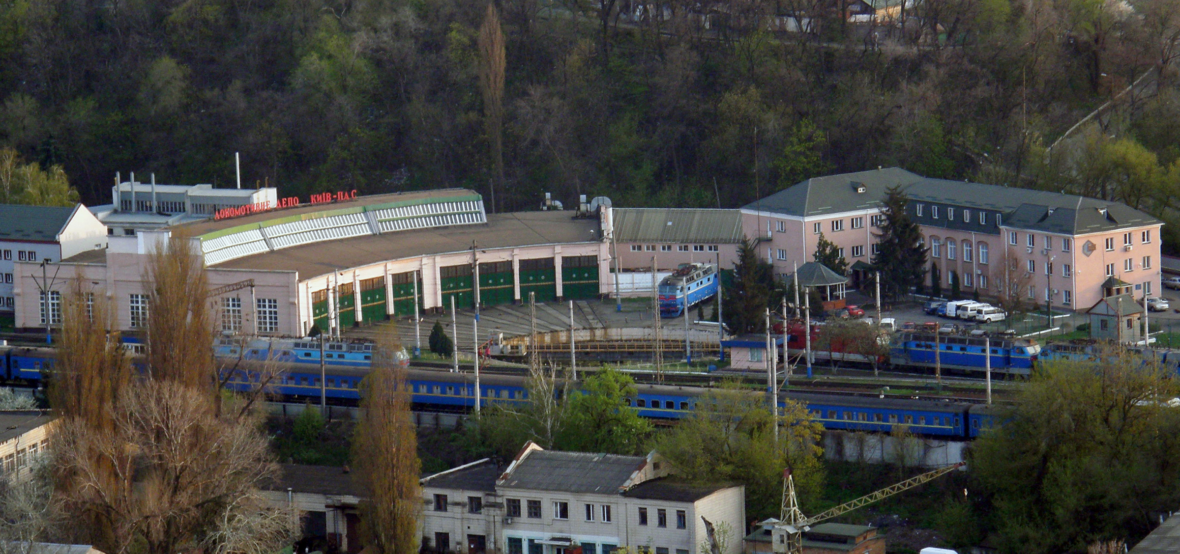 веерное депо Киев-Пассажирский